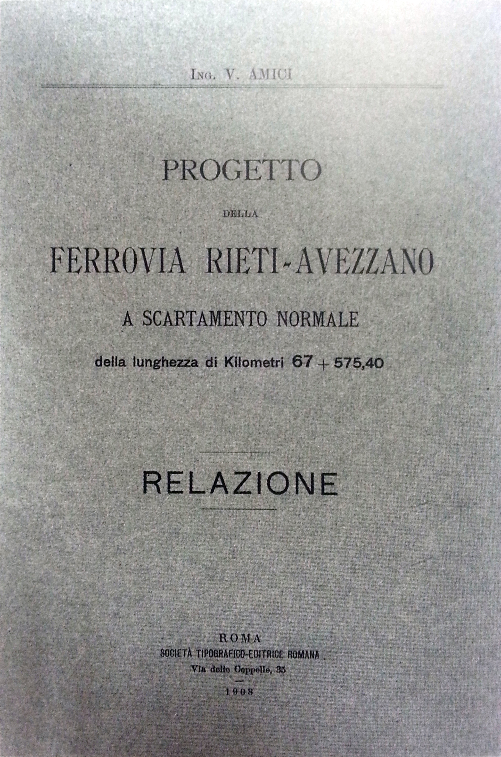 Frontespizio del progetto del 1908 dell'ingegner Venceslao Amici per la ferrovia Rieti-Avezzano